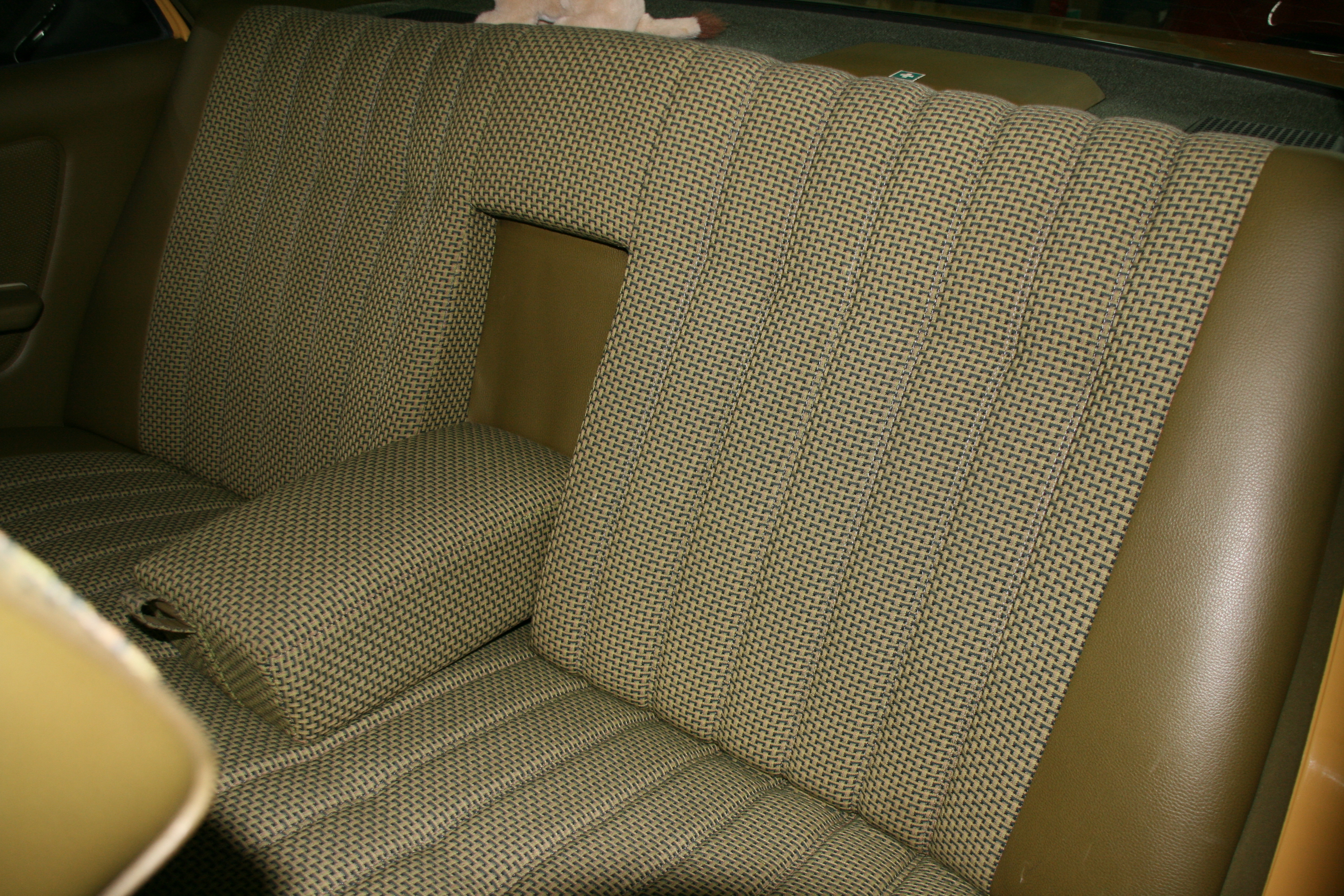 Rücksitzbank MB 230 W123 aus 1977 ohne hintere Sicherheitsgurte